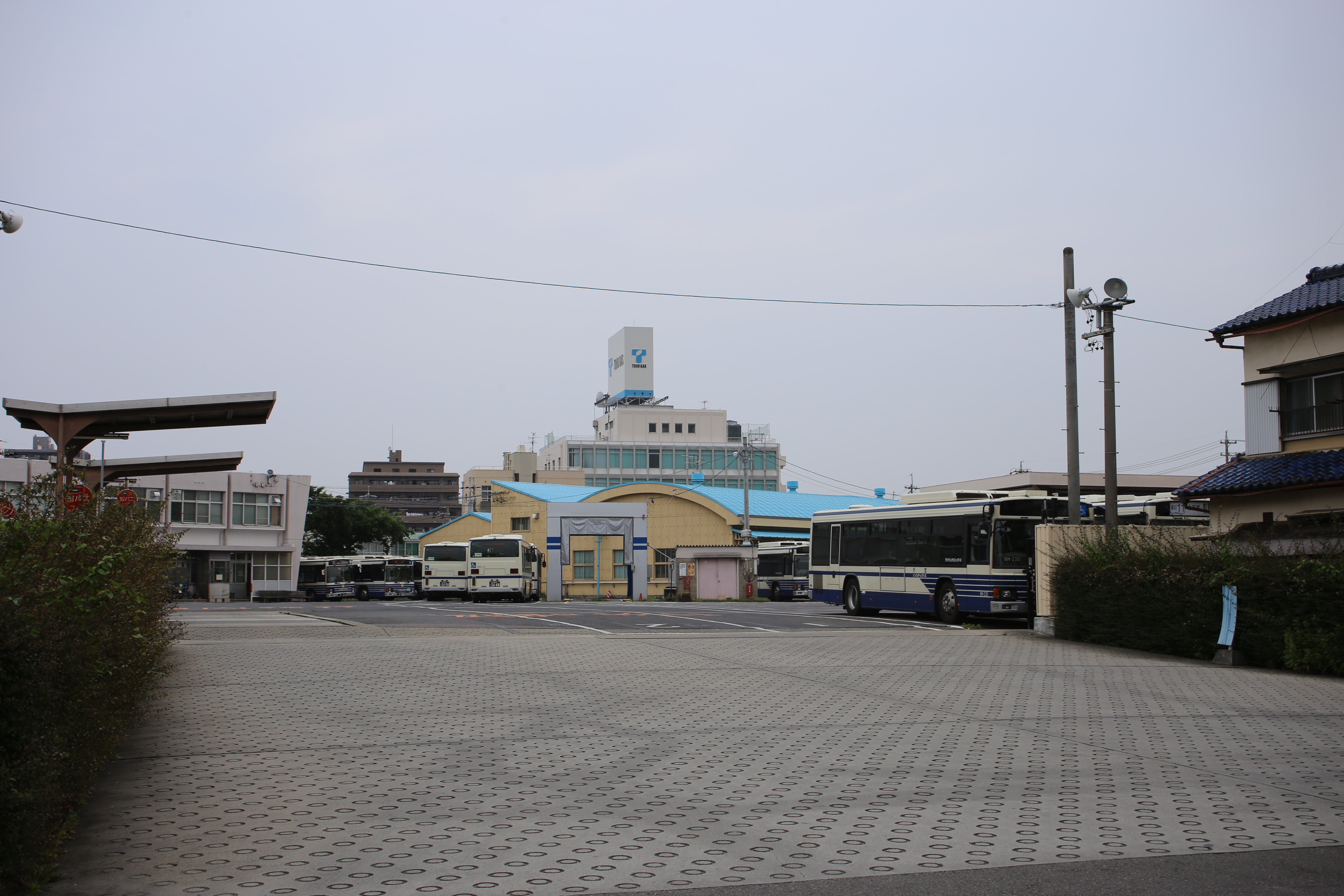 名古屋市北区丸新町の名古屋市営バス如意営業所を南側公道西側より撮影